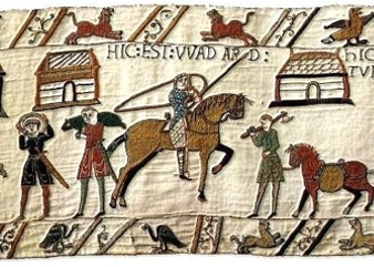 Le chevalier Wadard, sur la Tapisserie de Bayeux